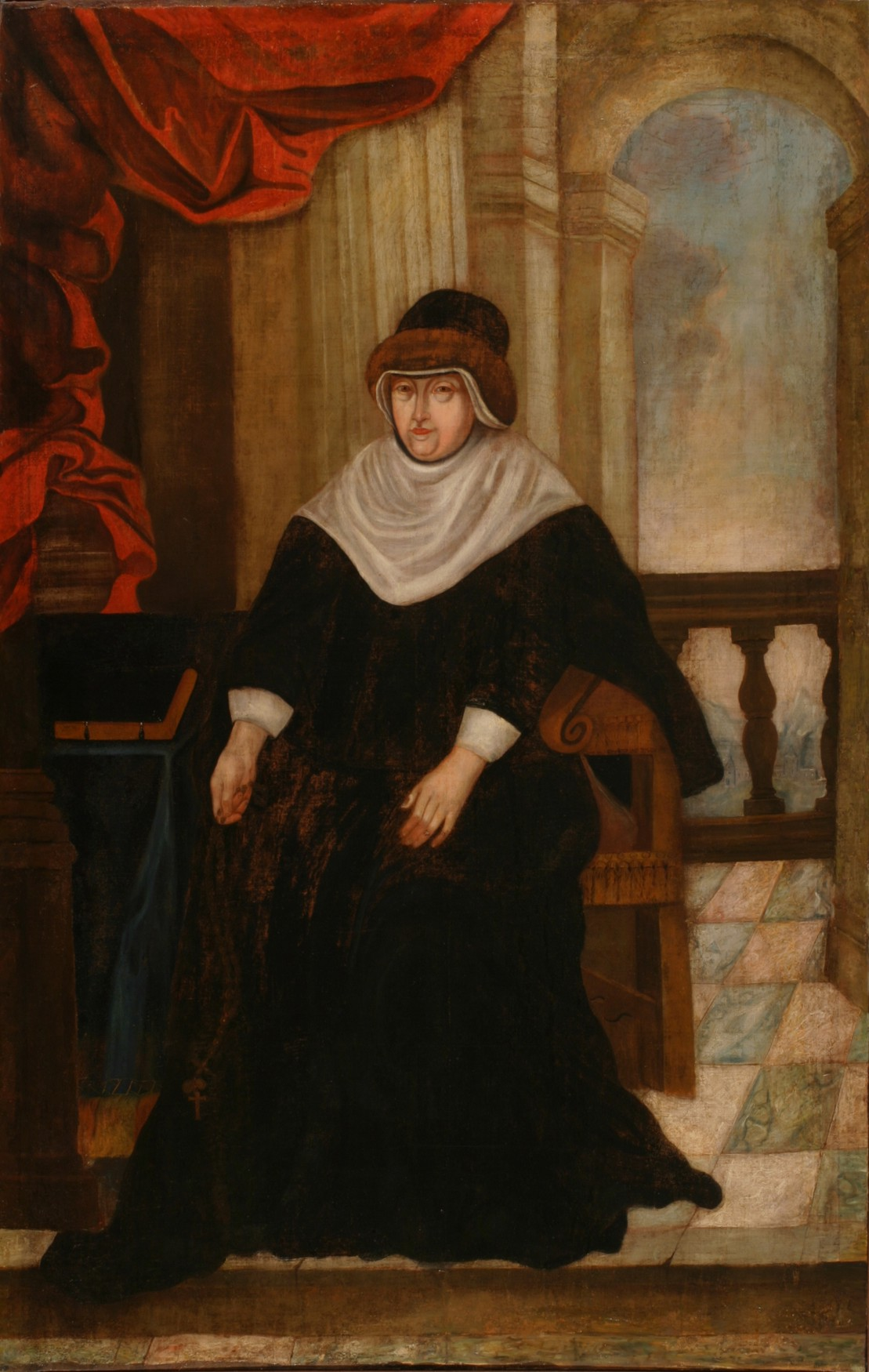 Беларуская (тарашкевіца): Партрэт Аляксандра Мар'яны Весялоўскай (Alaksandra Marjana Viesiałoŭskaja) з роду Сабескіх (Sabieski)